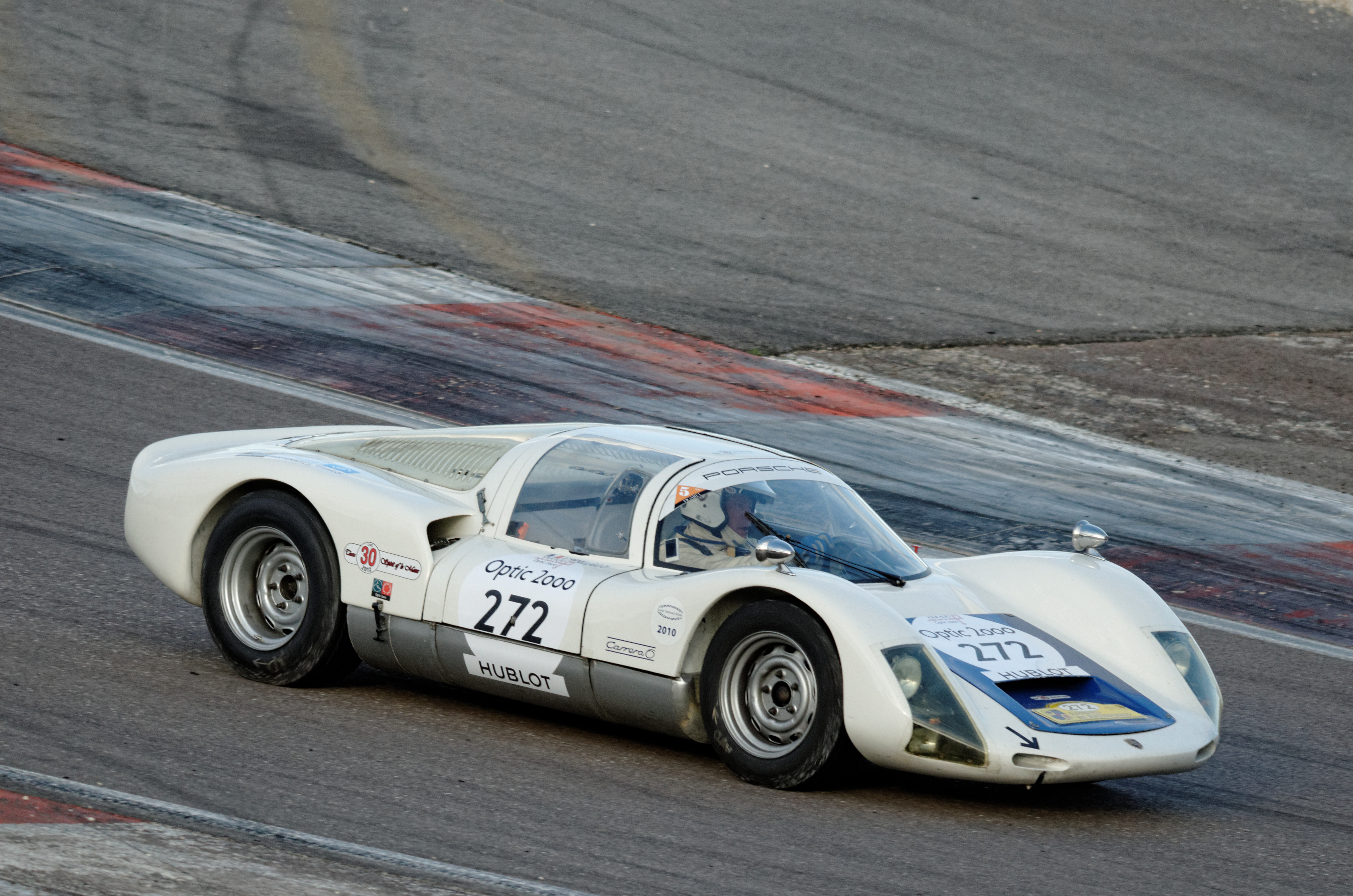 Porsche 906, Tour Auto 2014, étape sur le Circuit de Prenois.